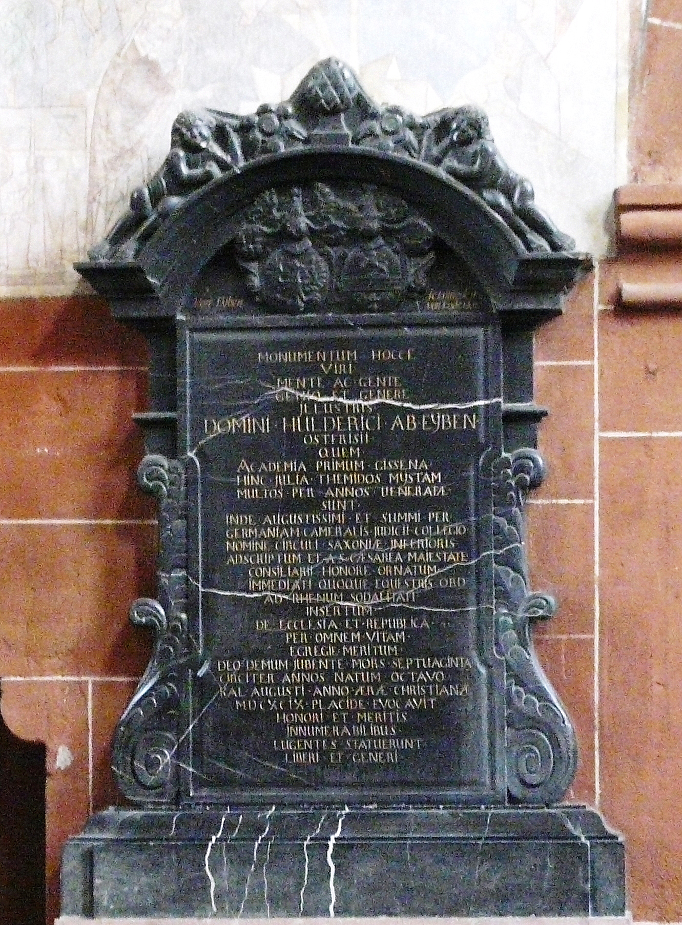 Epitaph des Hulderich von Eyben im Wetzlarer Dom, Wetzlar (Hessen)